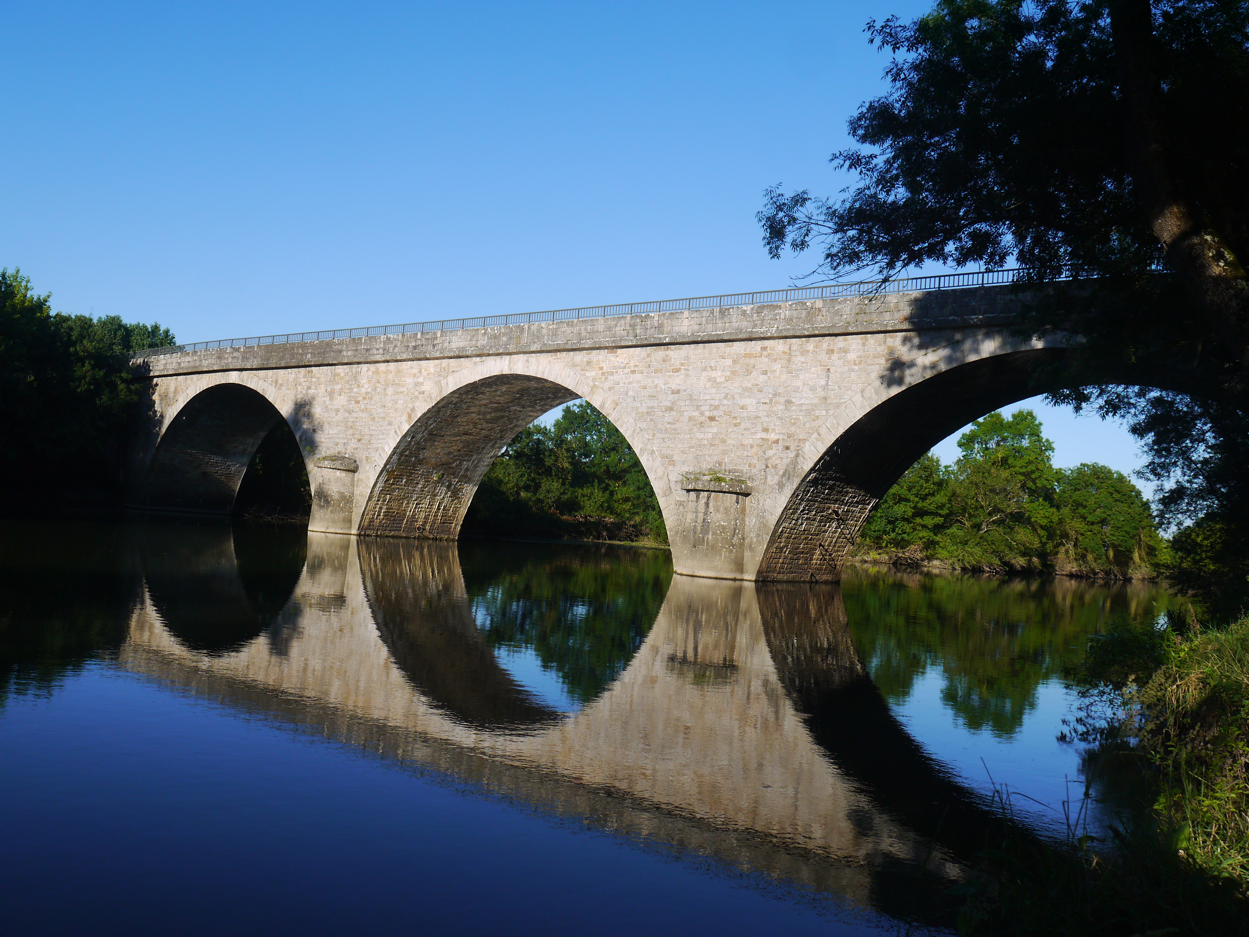 Pont de la D 113 sur le Loir à Villevêque (Maine-et-Loire, France).